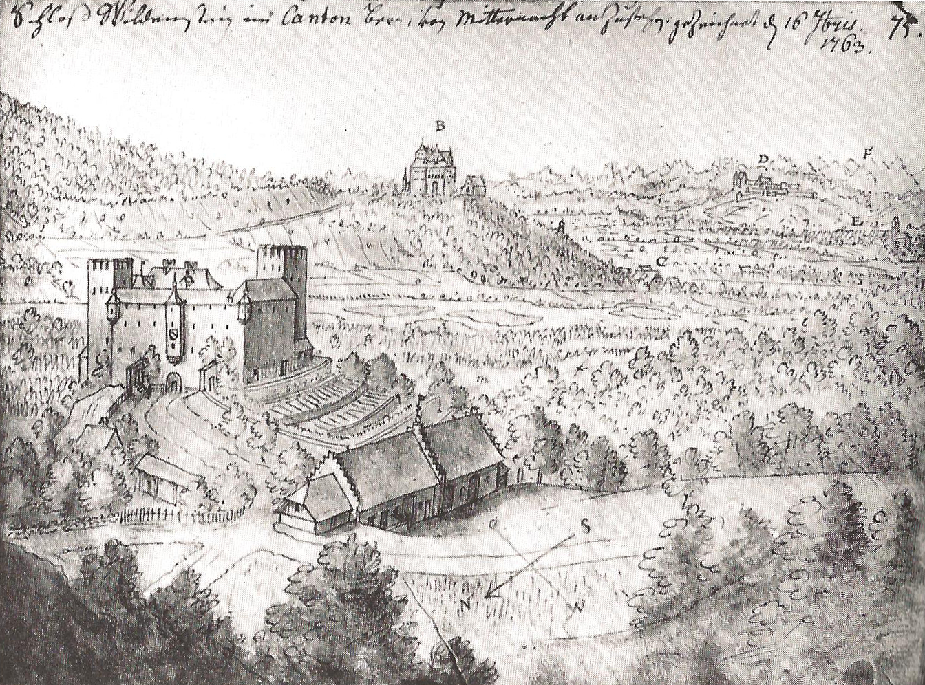 Schloss Wildenstein von Nordwesten.